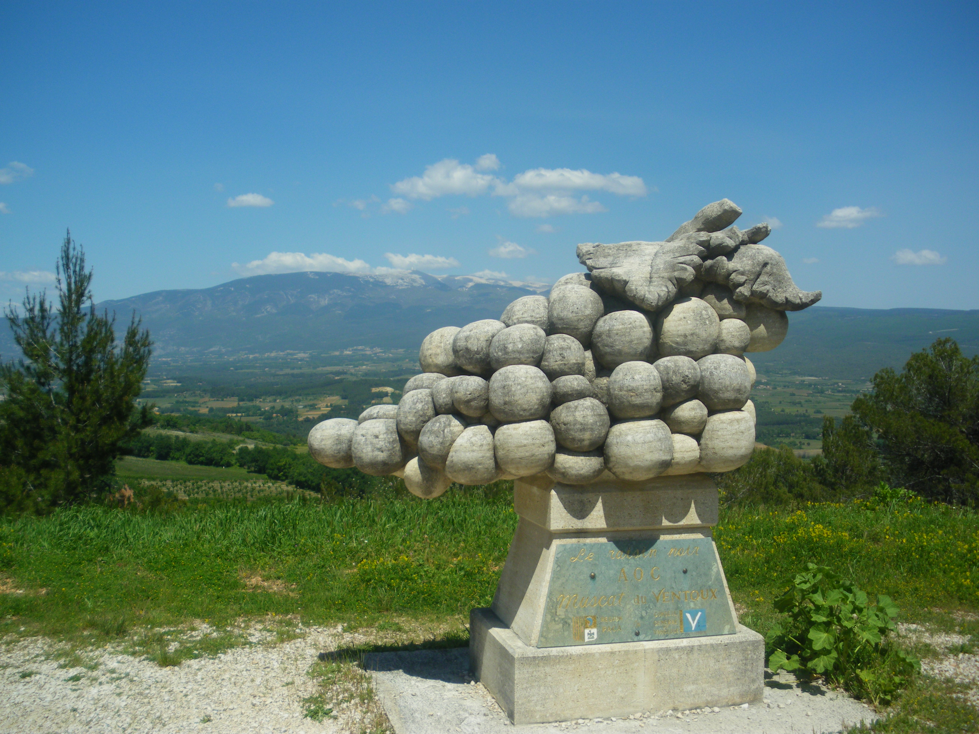 Sculpture du Raisin Noir - AOC du Mont Ventoux, à Blauvac, Vaucluse